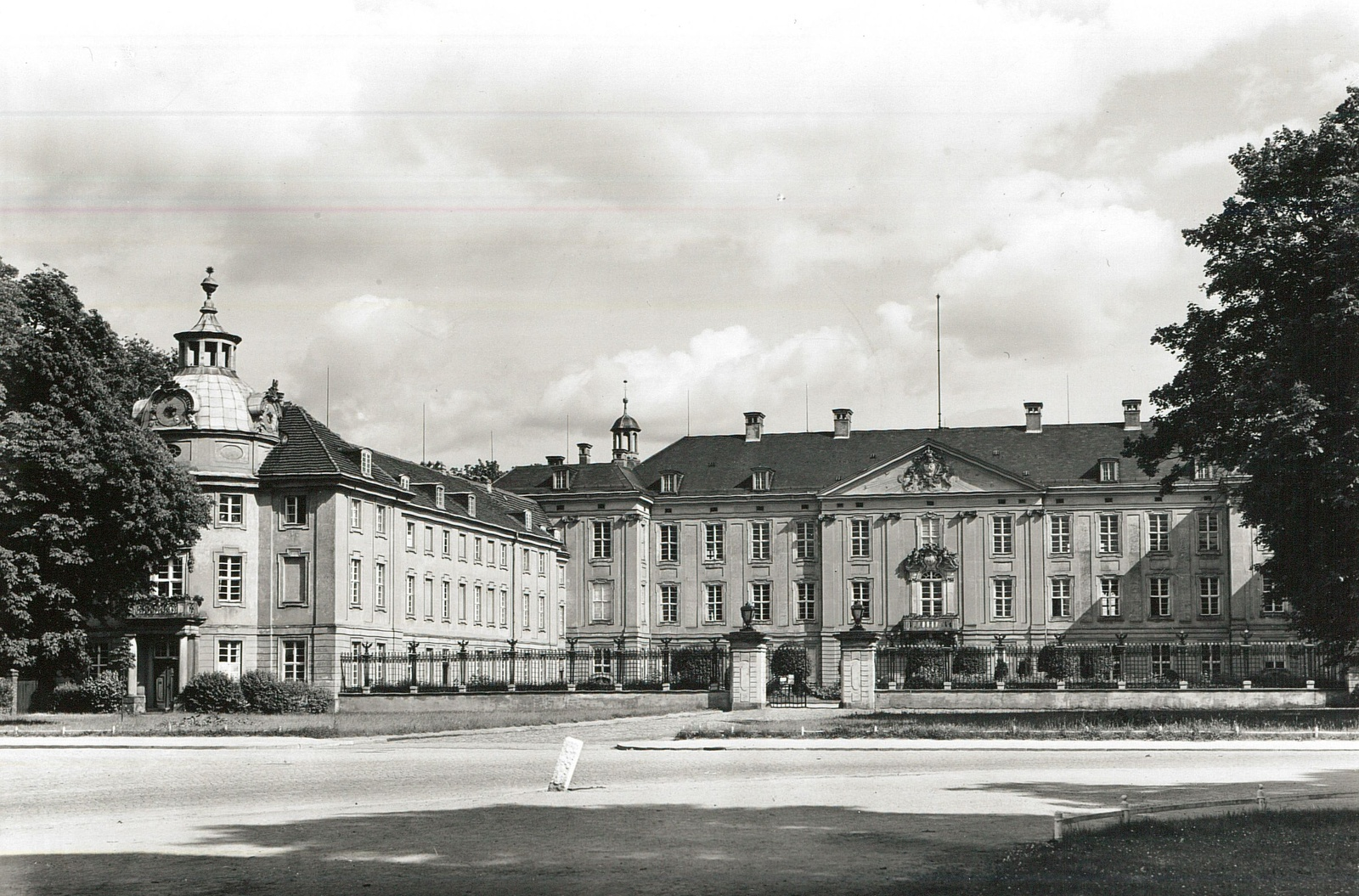 Fotopostkarte des Residenzschlosses in Schwedt